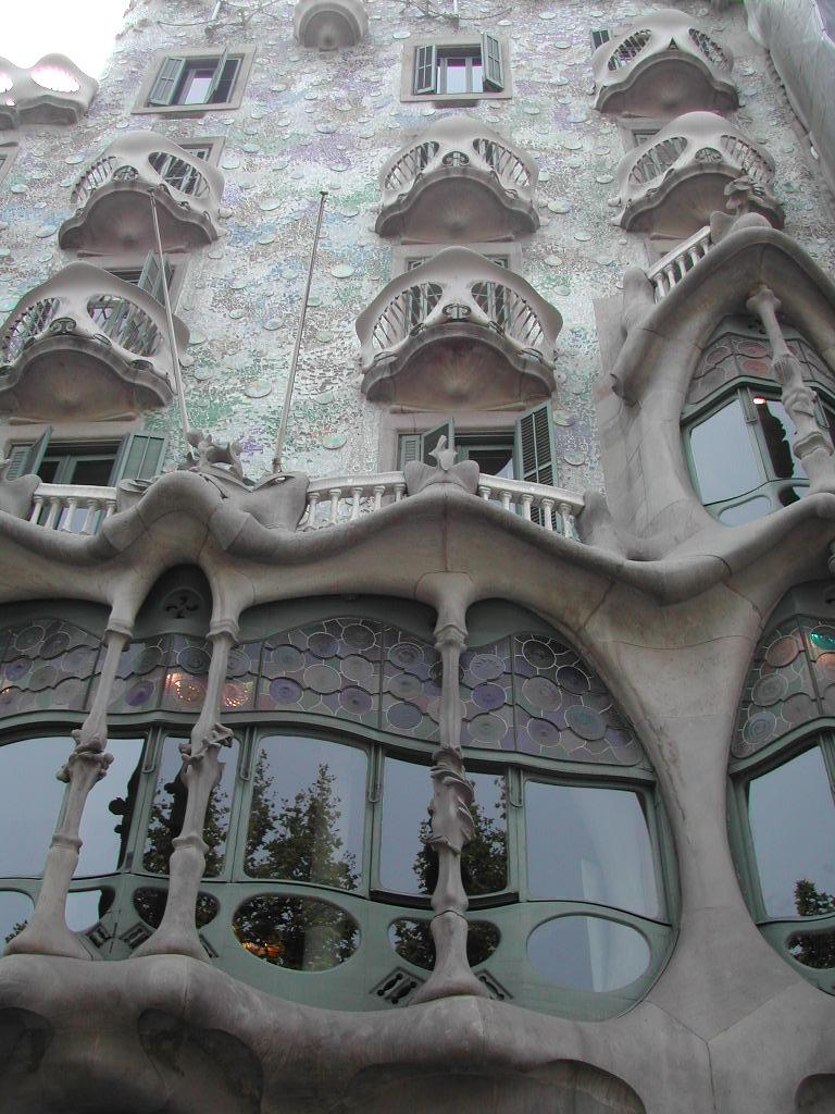 D'Casa Batlló vum Antoni Gaudí